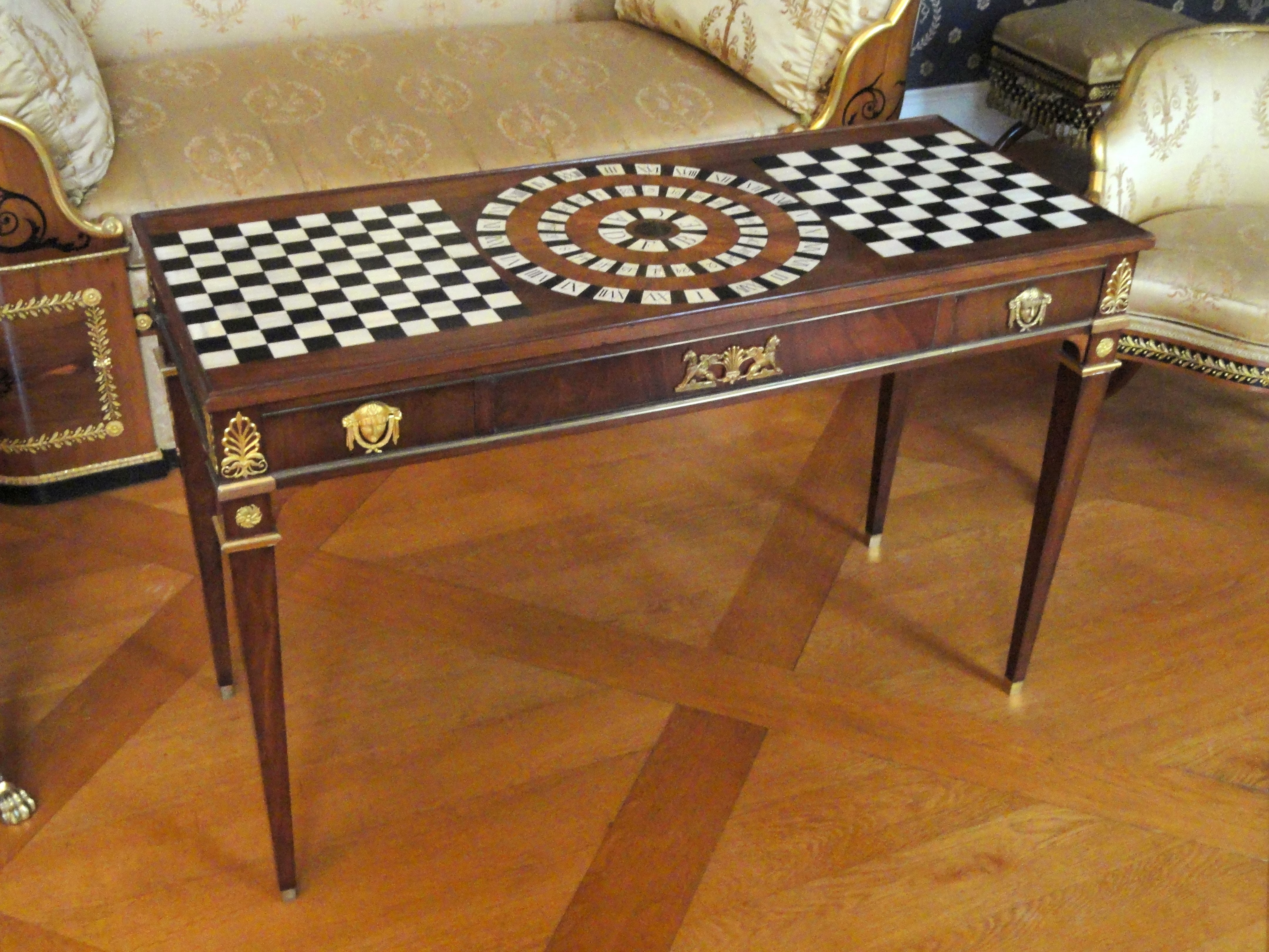 Furniture exhibited in the Münchner Residenz, Munich, Germany.